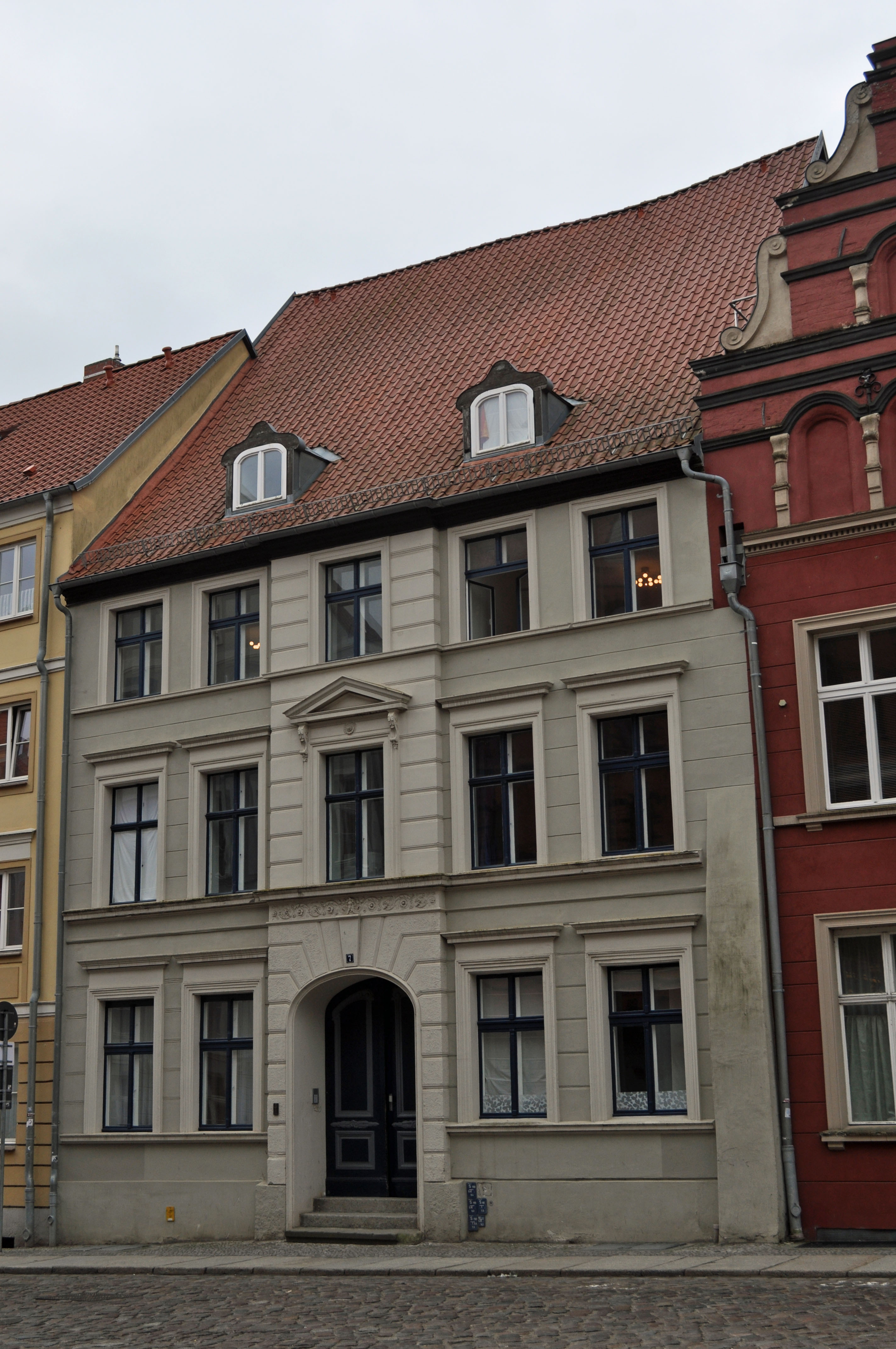 Gebäude bzw. Gebäudedetail in Stralsund. Straße und Hausnummer siehe Dateiname.